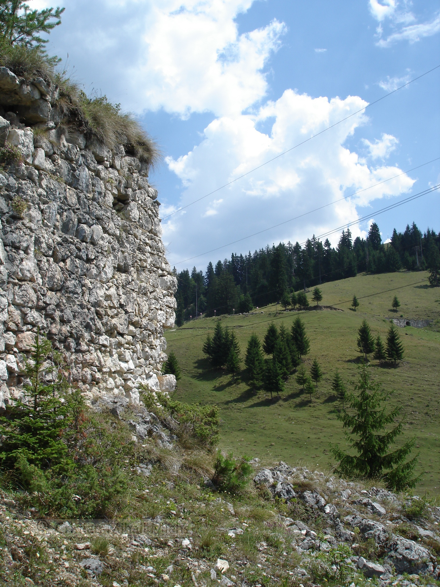 Cetatea Oratea, Cod LMI: AG-II-a-A-13763. În plan îndepărtat, șoseaua Câmpulung - Brașov (DN73).